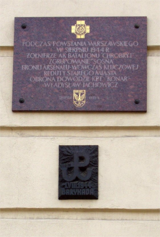 Tablica mieszcząca się na ścianie Arsenału, upamiętniająca walki baonu Chrobry I (fot Zu)